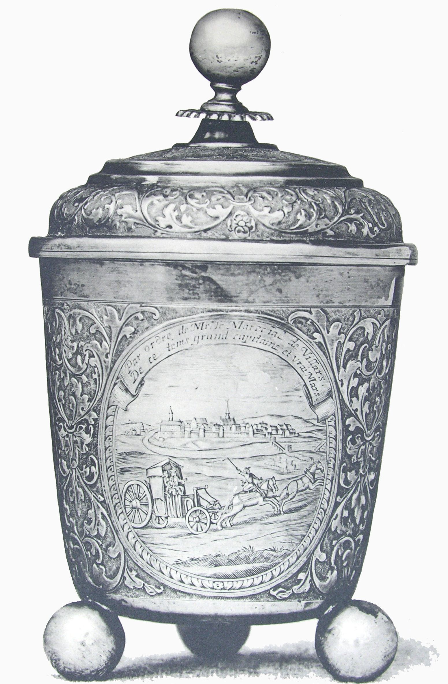 Gobelet d'André Falquet (Kunstgegenstand), Seite 2.